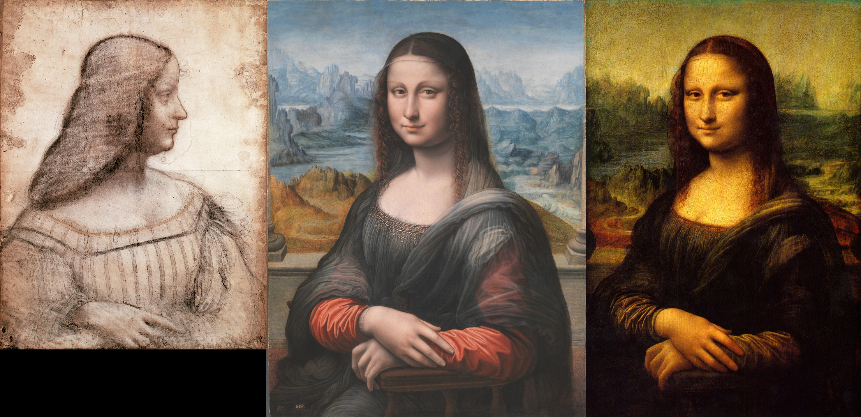 Leonardo da Vinci 1499 – Isabella d’Este (Louvre, Paris) Leonardo da Vinci 1502-06 – Mona Lisa (Louvre, Paris) Leonardo da Vinci (Werkstatt) 1502-06 – Mona Lisa 2012 gereinigt (Prado Madrid)